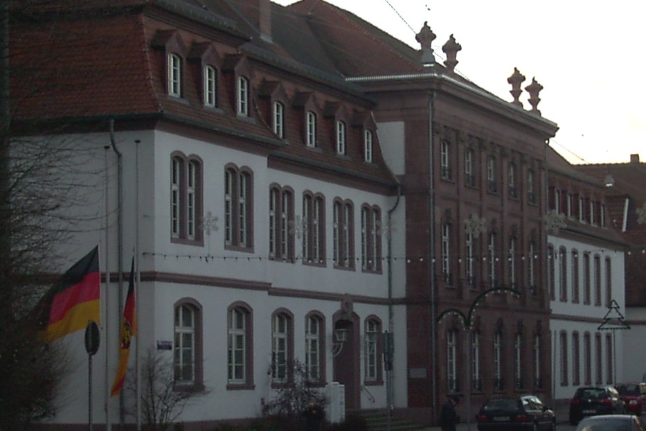 Landratsamt des Landkreises Neunkirchen in Ottweiler/Saarland